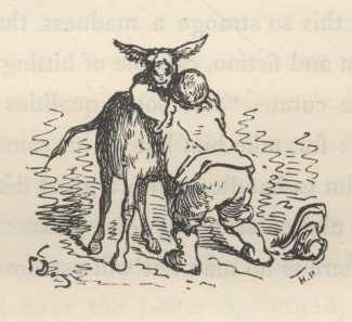 Gustave Doré, ilustração para "Dom Quixote" de Miguel de Cervantes